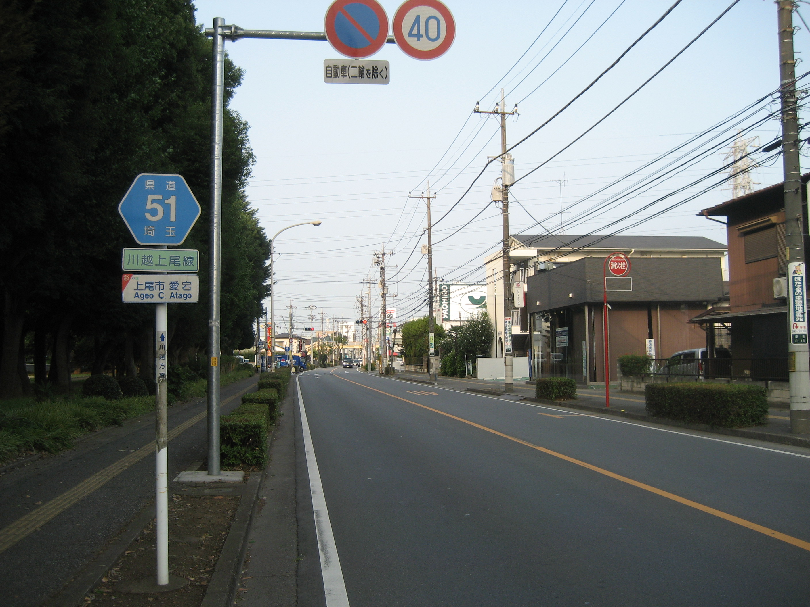 埼玉県道51号線上尾市愛宕付近